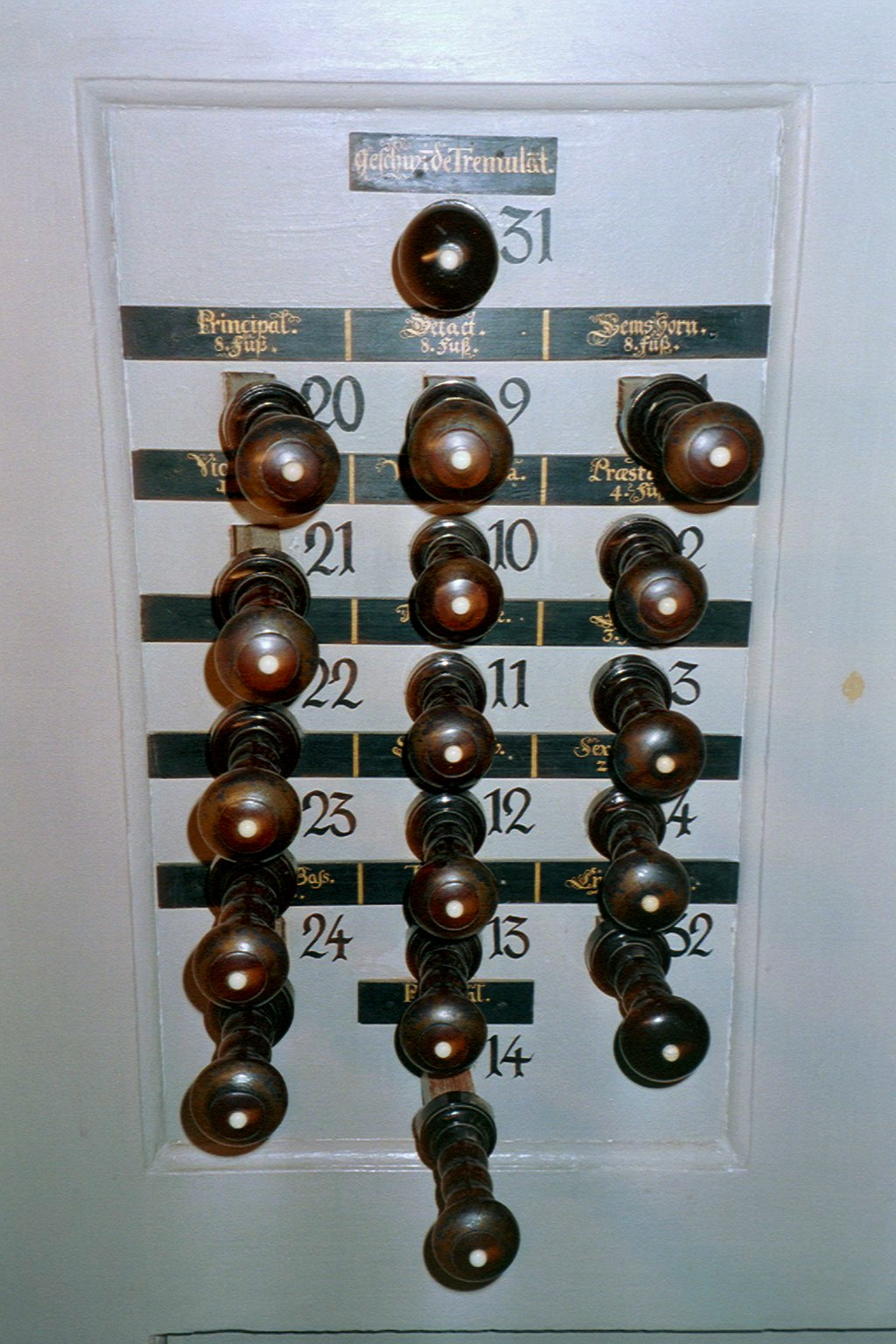 linkes Registerfeld der Herbst-Orgel von 1732 in Lahm/Itzgrund